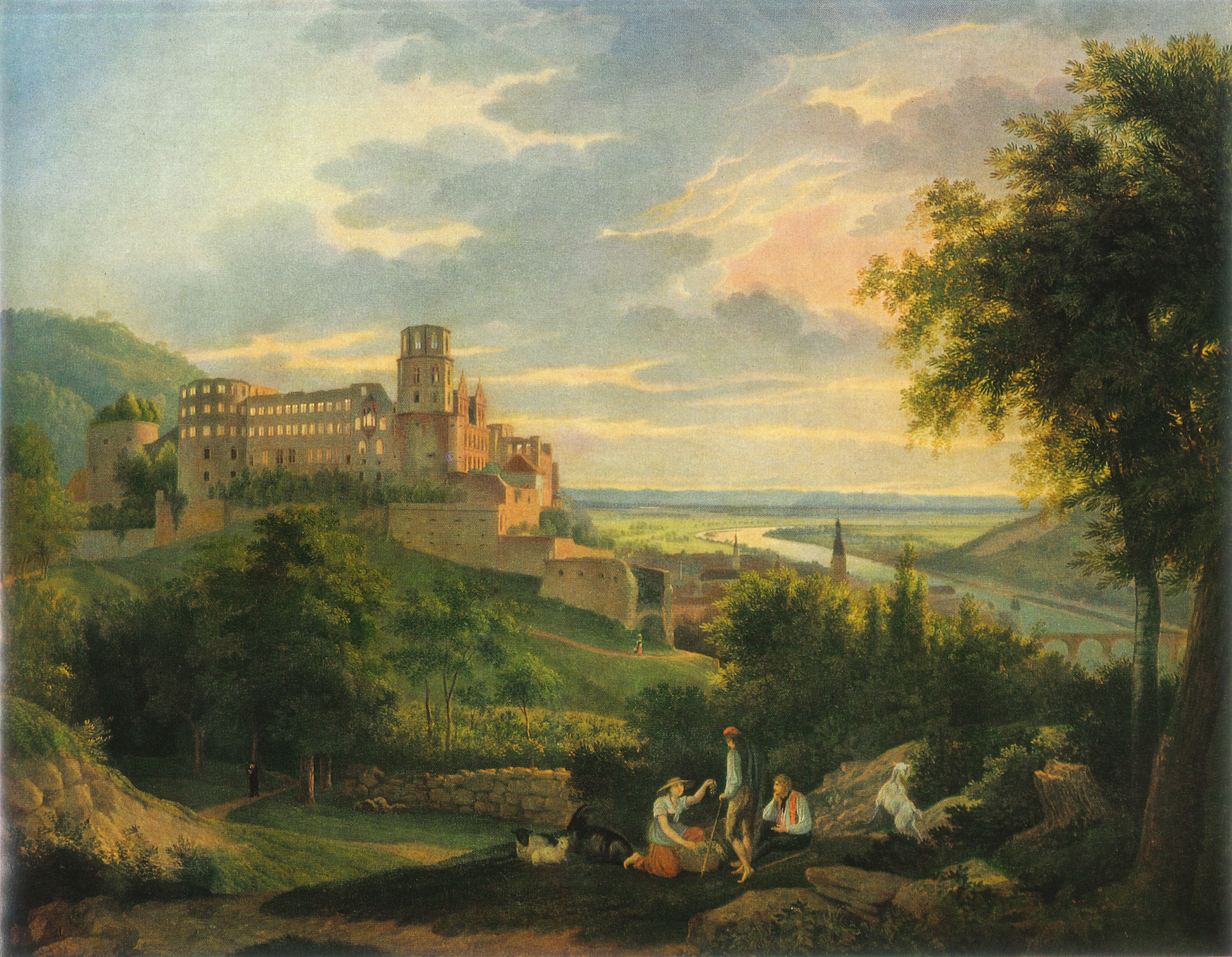 Jakob Wilhelm Roux, Heidelberger Landschaft mit dem Schloss, um 1820